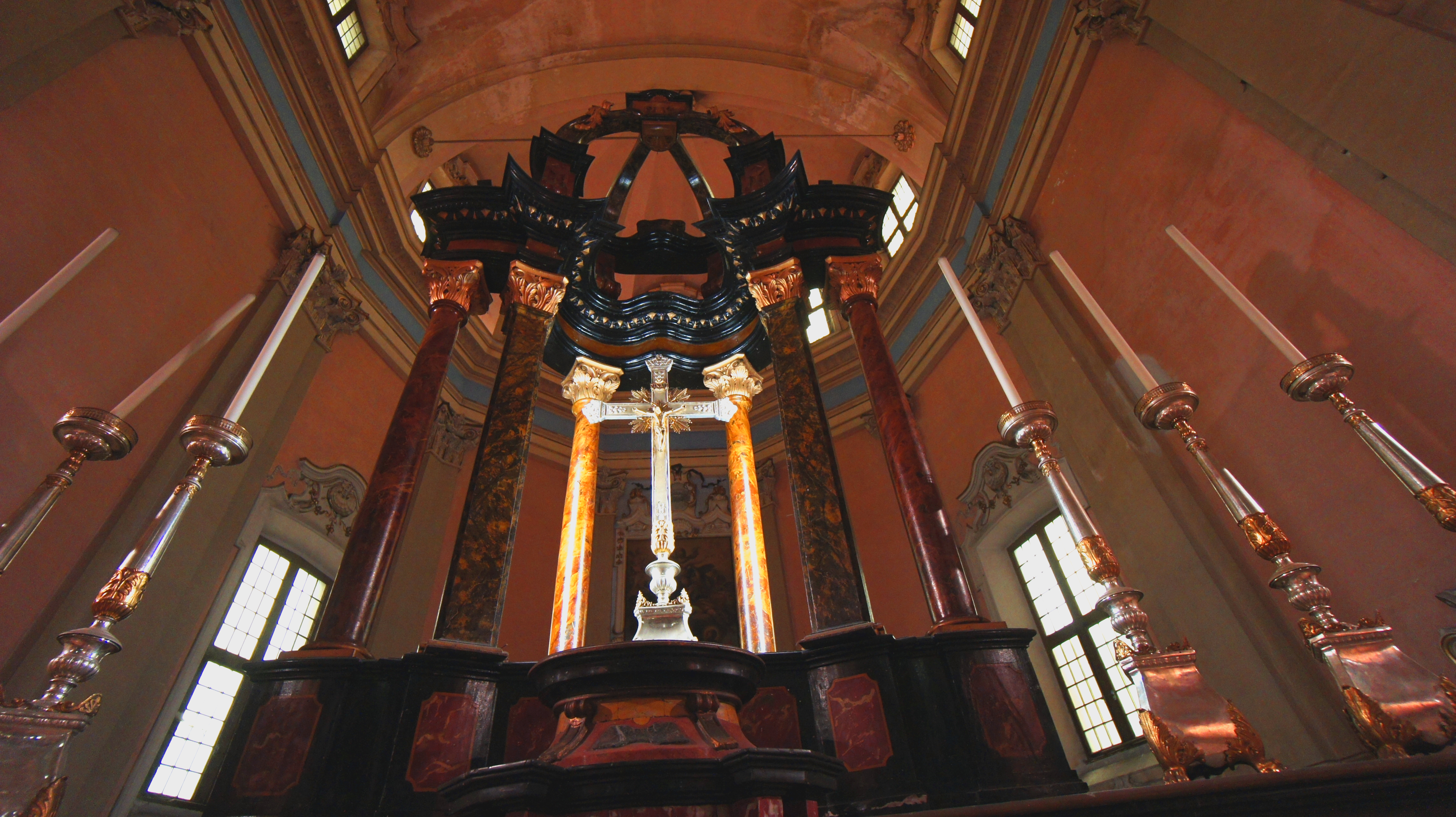 Chiesa di Sant'Ambrogio della Vittoria e annessa ex abbazia cistercense This is a photo of a monument which is part of cultural heritage of Italy.